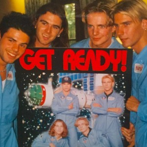 CD-voorstelling "Apollo"